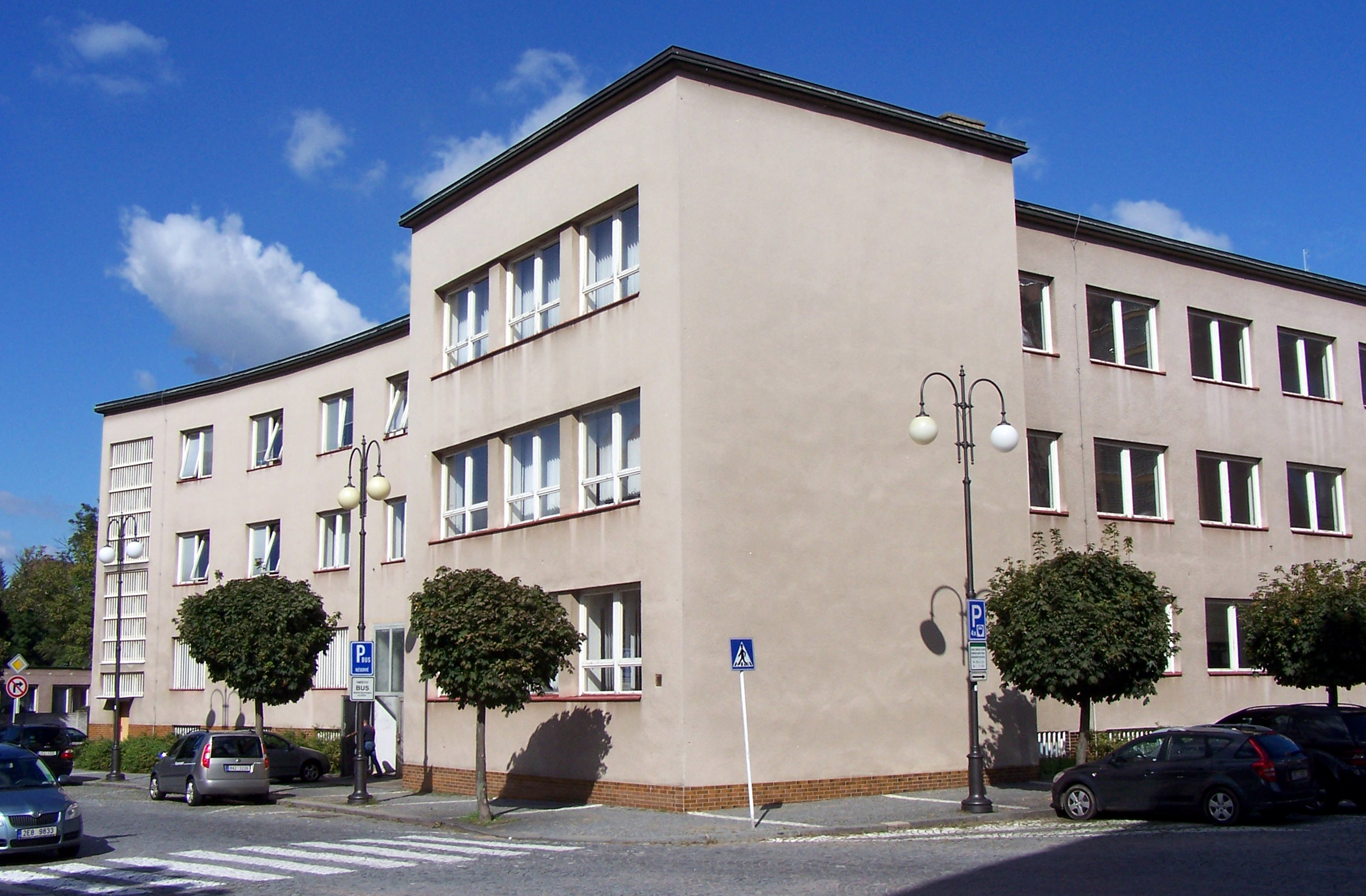 Okresní soud v Pardubicích, ulice Na Třísle.